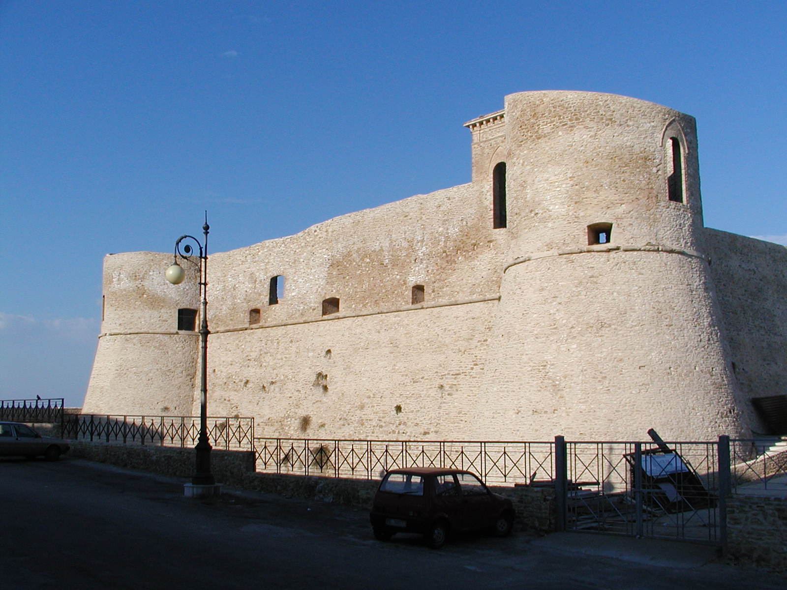 il il castello dell conte mucci giacomo